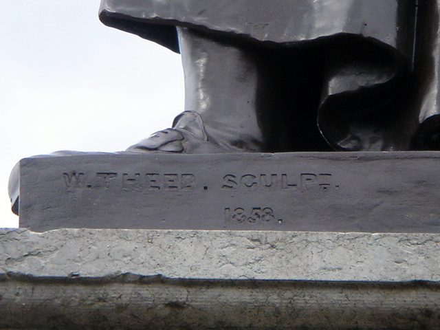 Sir Isaac Newton (1642–1727) par William Theed (1804–1891), 1858, bronze ; St Peter's Hill, Grantham. Vue de profil gauche. Détail : signature et date.